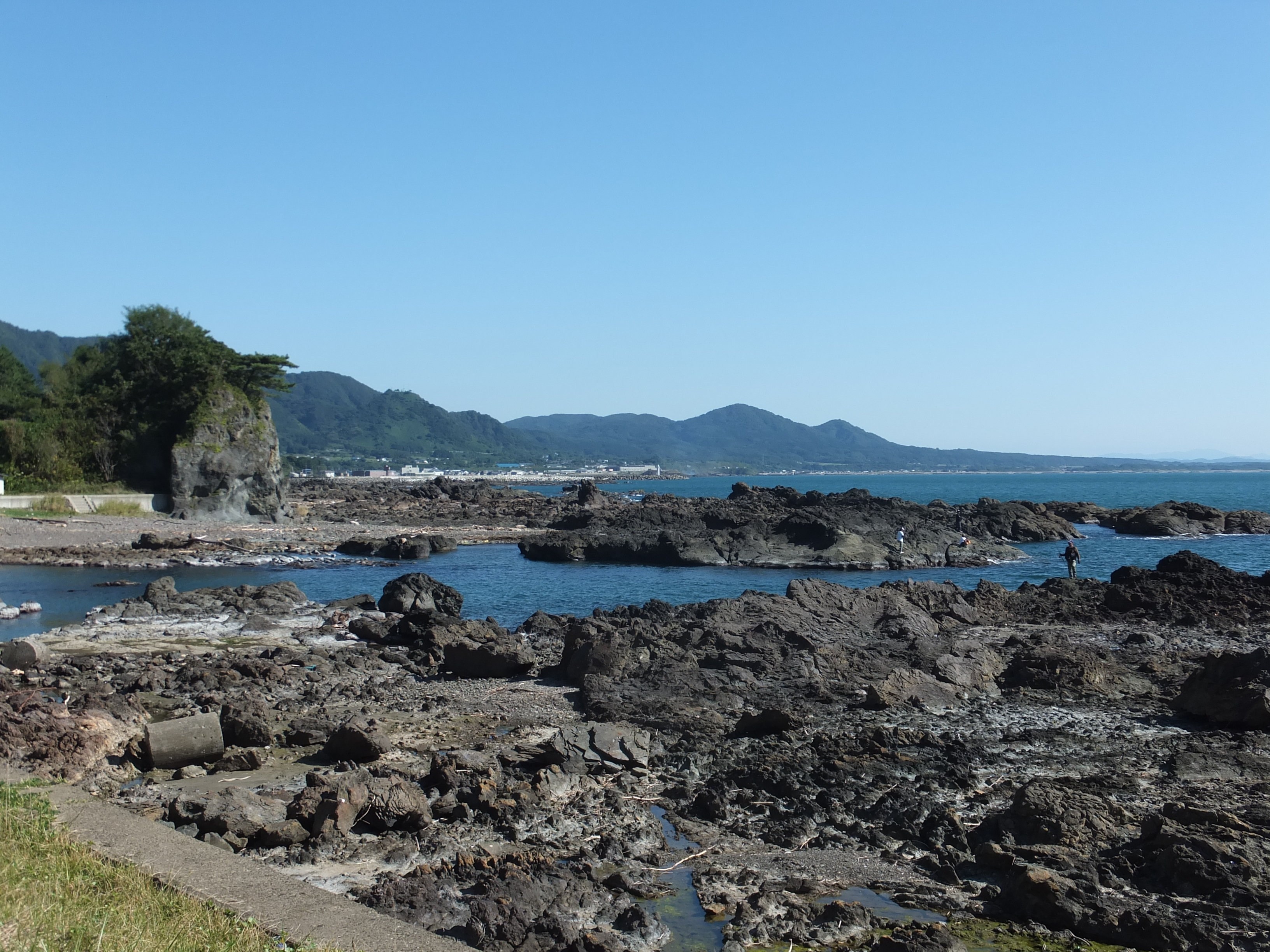 秋田県八峰町、滝ノ間海岸にて。黒い岩は八峰町一帯の特徴である。